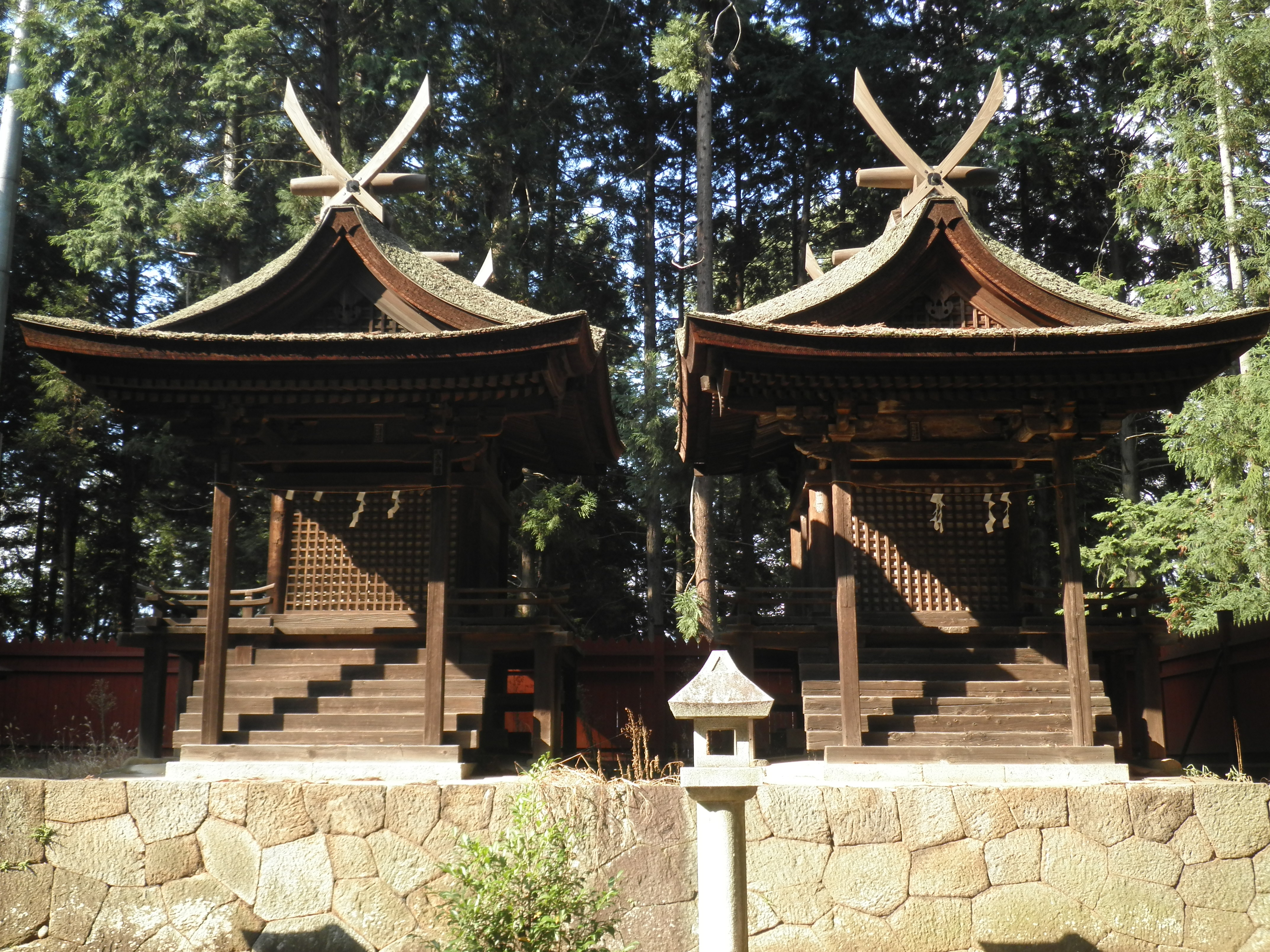 甲州市・熊野神社の本殿